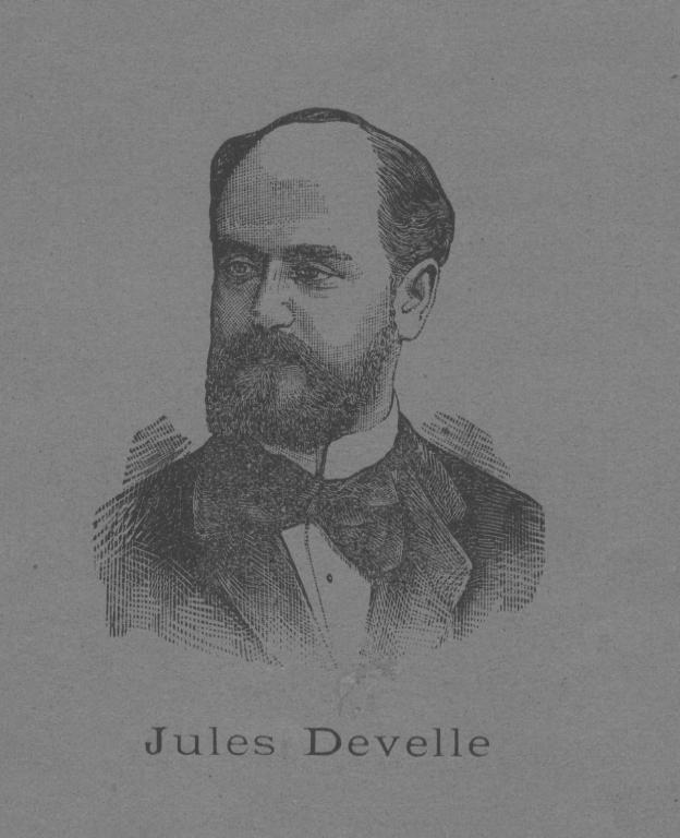 portrait de Jules Develle (1845-1919)